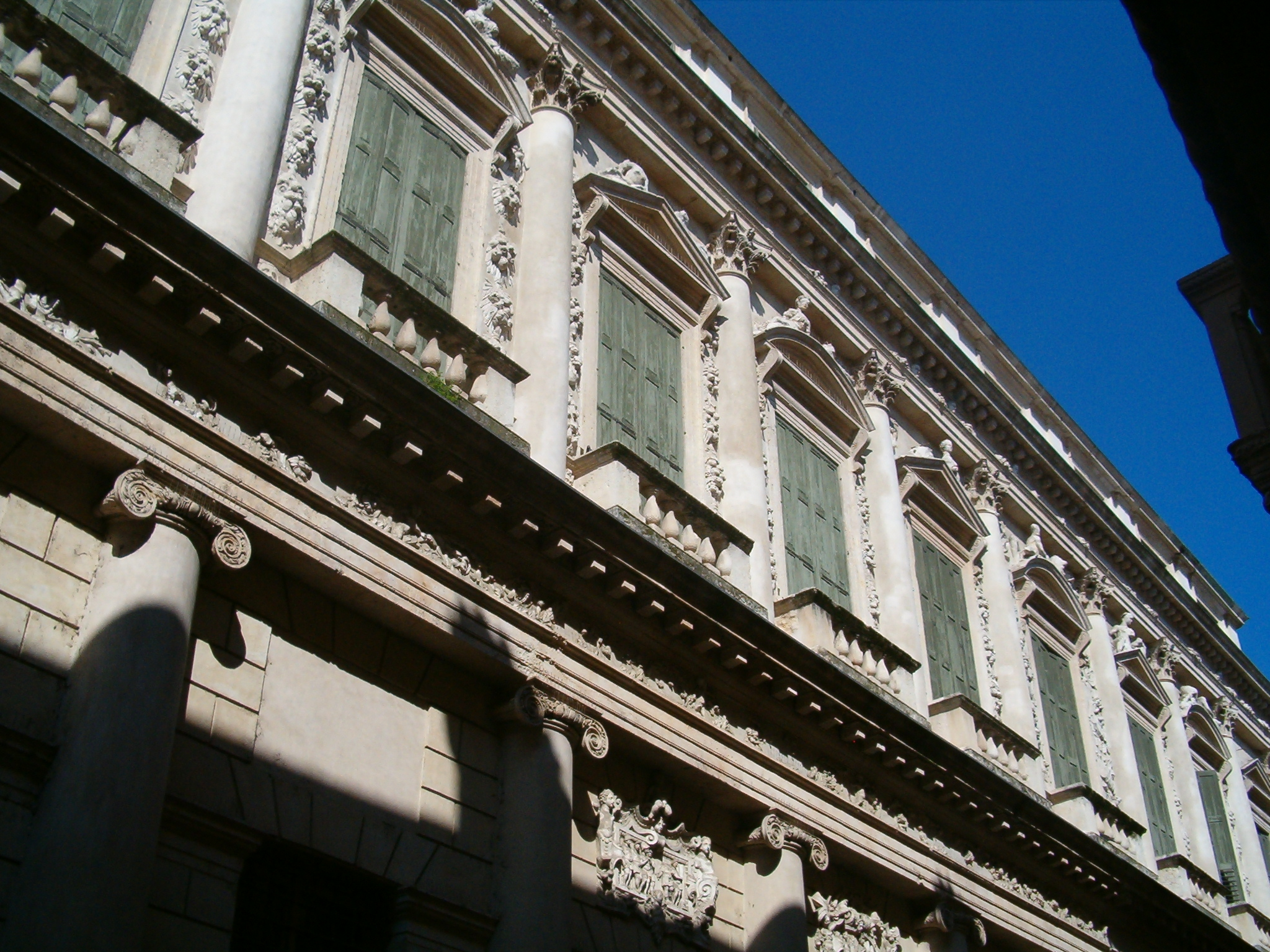 Palazzo Barbaran Da Porto, Vicenza. Arch. Andrea Palladio (1569-1575).